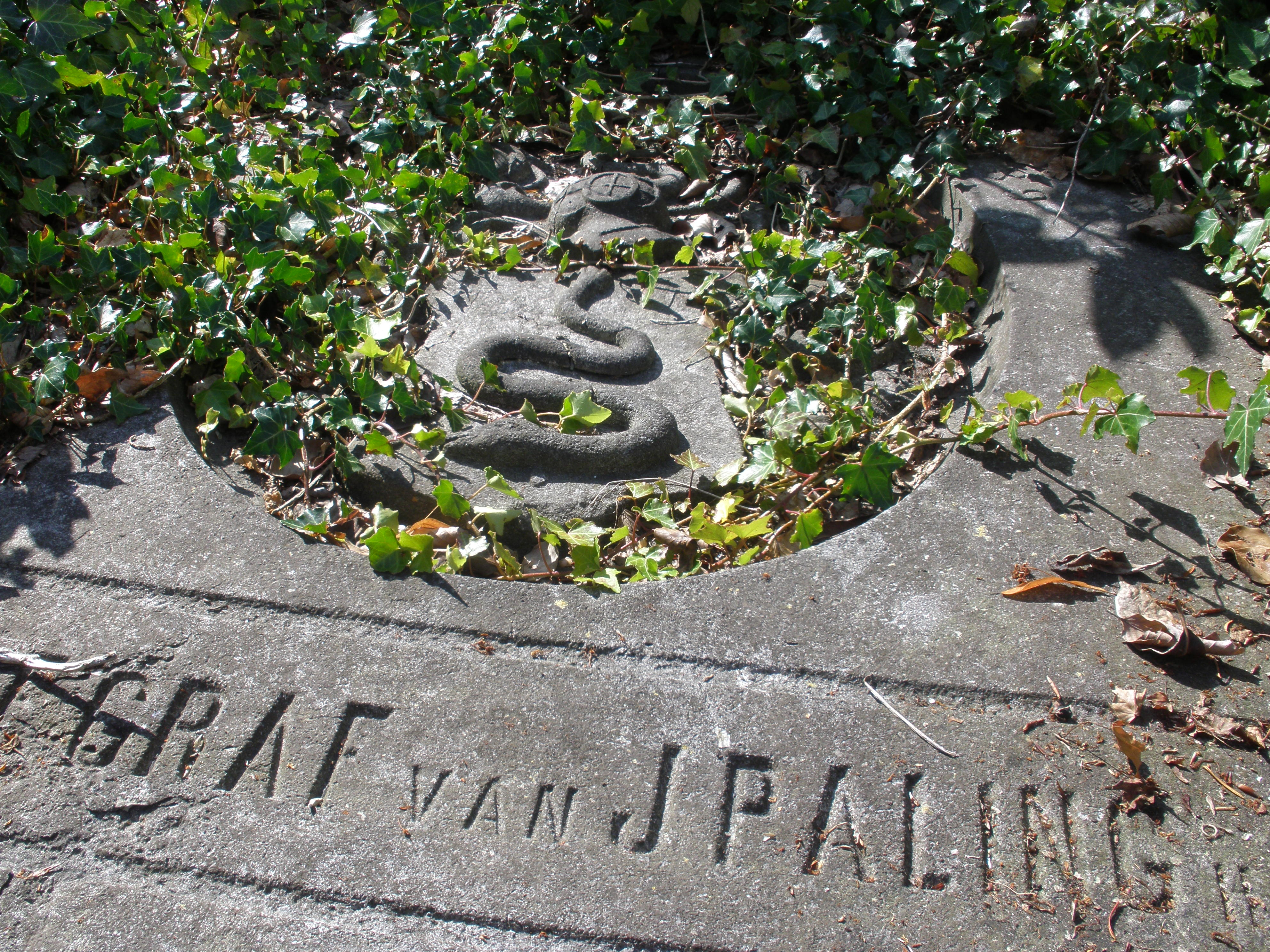 Graf van de familie Paling op de Algemene Begraafplaats Hogewal in Woerden. Het familiewapen bestaat uit een duikershelm met een paling.